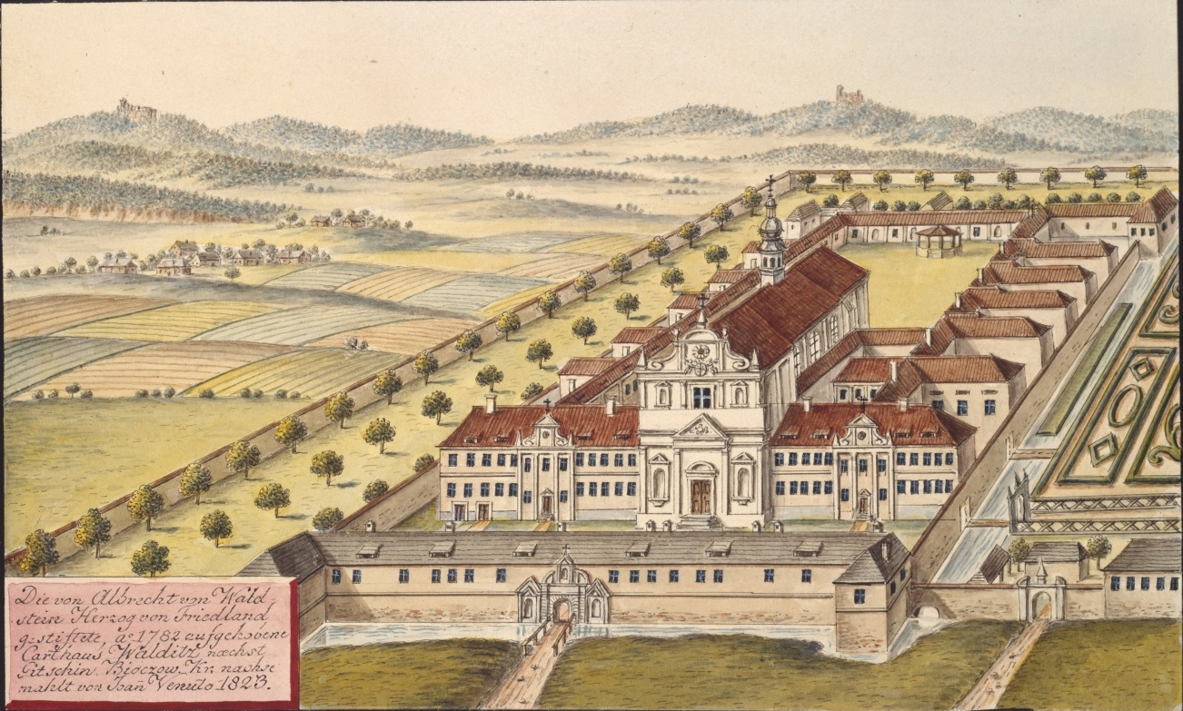 Valdická kartouza. Die von Albrecht von Waldstein Herzog von Friedland gestiftete, Ao 1782 aufgehobene Carthaus Walditz naechst Gitschin, Bidczow. Kr. nachgemahlt von Joan Venuto 1823